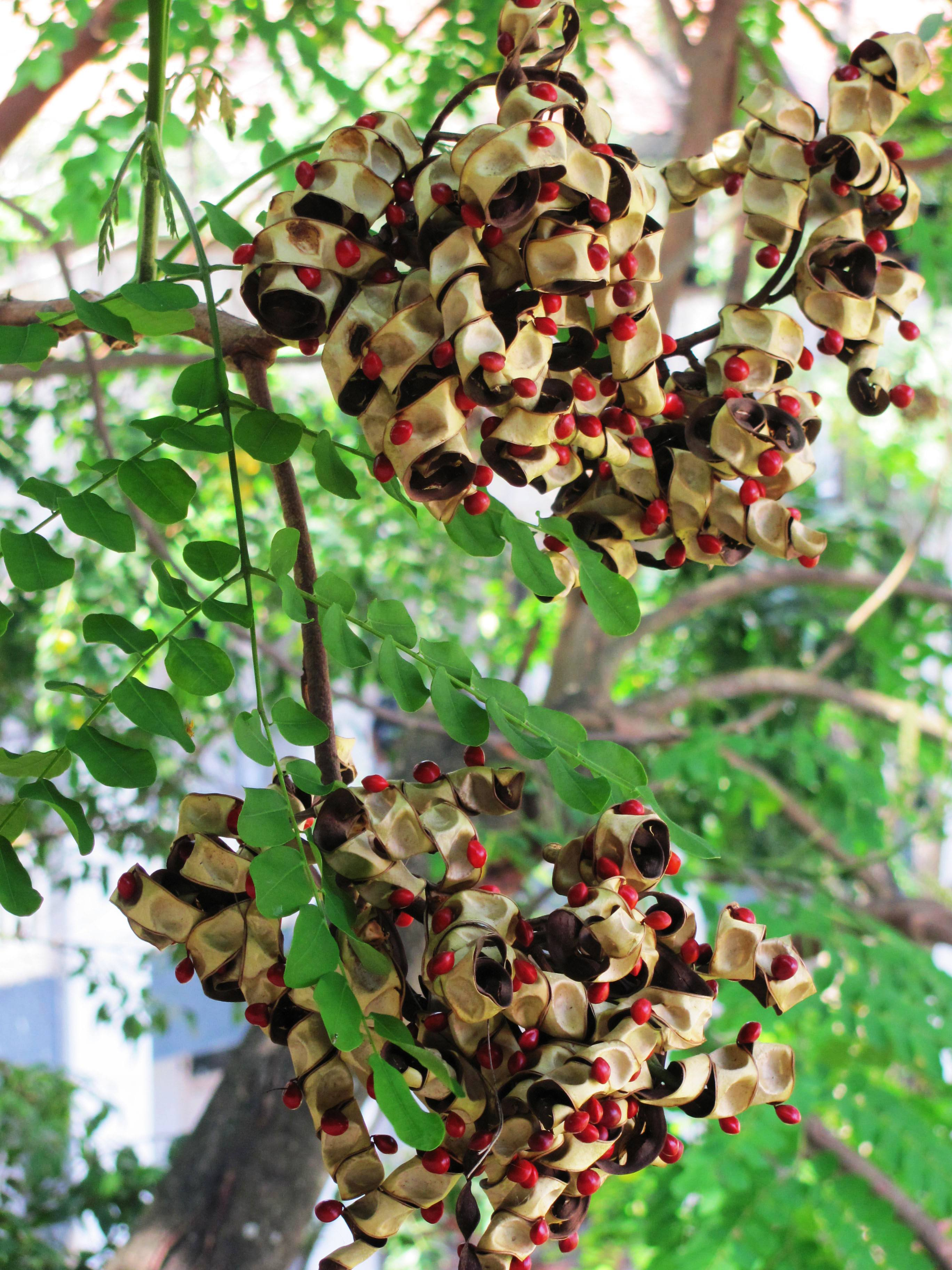 മഞ്ചാടിക്കുലകൾ